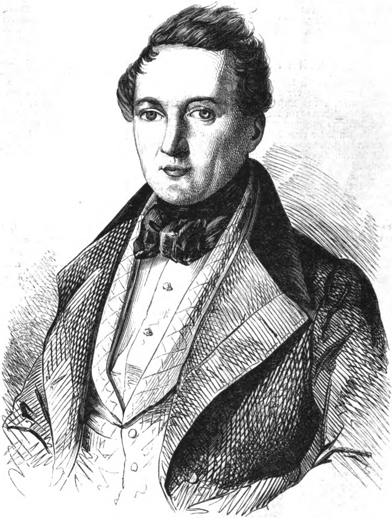 Karl von Metzsch auf Reichenbach, Abgeordneter der 1. Kammer des Sächsischen Landtages, 1847.